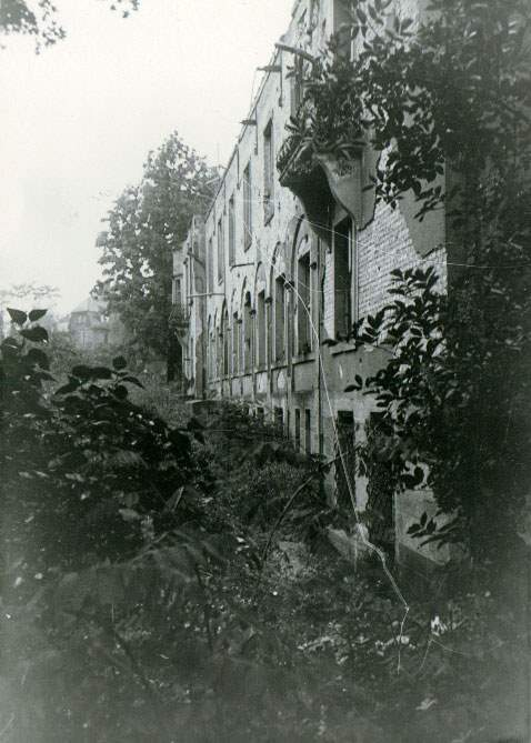 Rückseite Aliceheim nach dem letzten Bombenangriff 1945